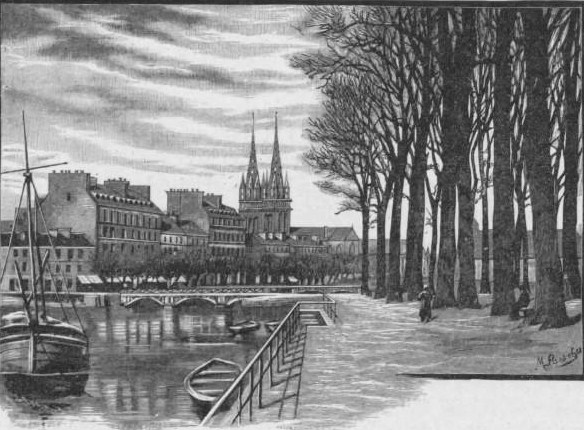 Louis Barroin : L'Odet et la cathédrale de Quimper (1899, Le Nouveau voyage en France, gallica)